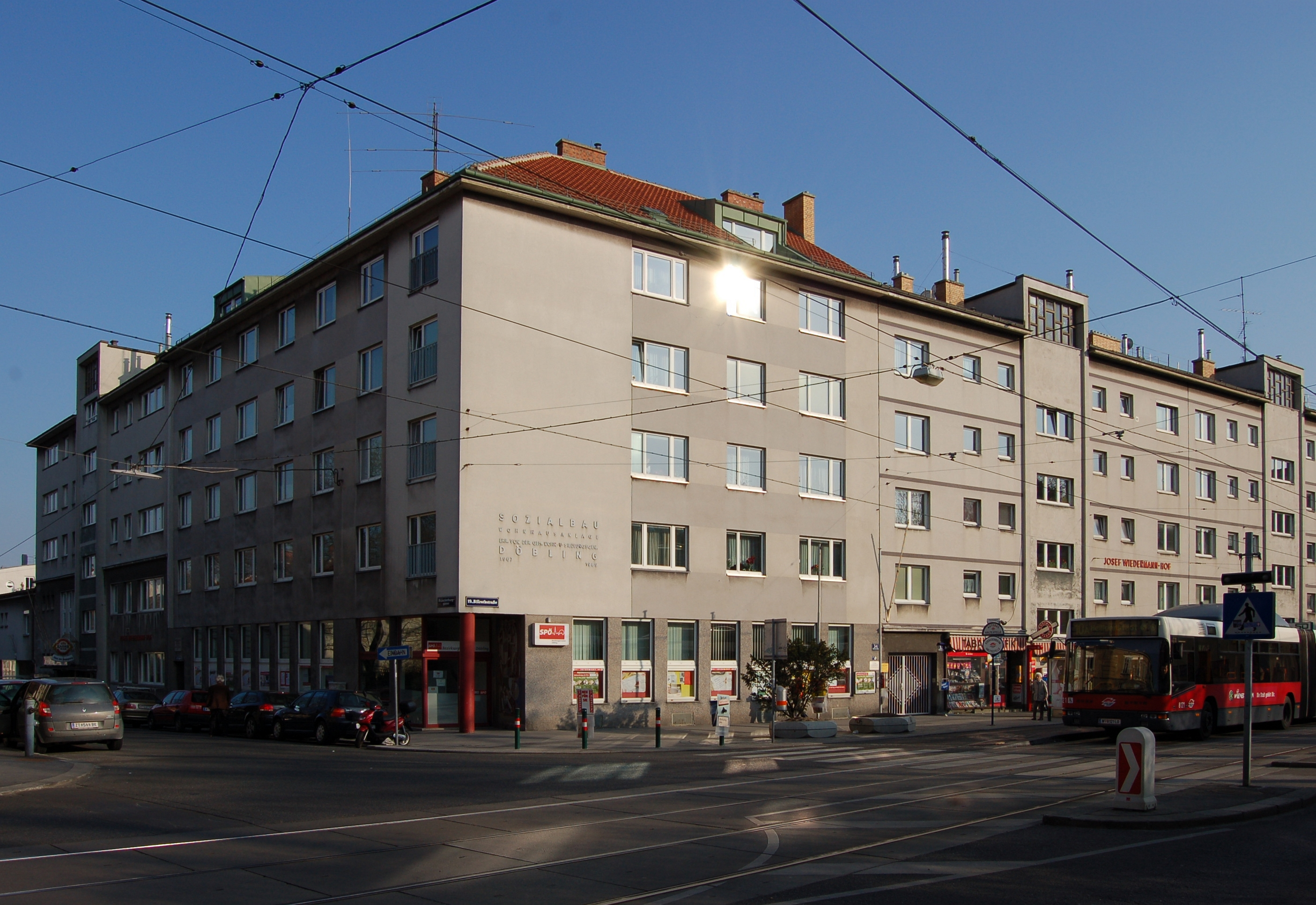 Fassade des Josef-Wiedermann-Hofes an der Ecke Billrothstraße/Gatterburggasse mit dem Sozialbau (Eckgebäude)